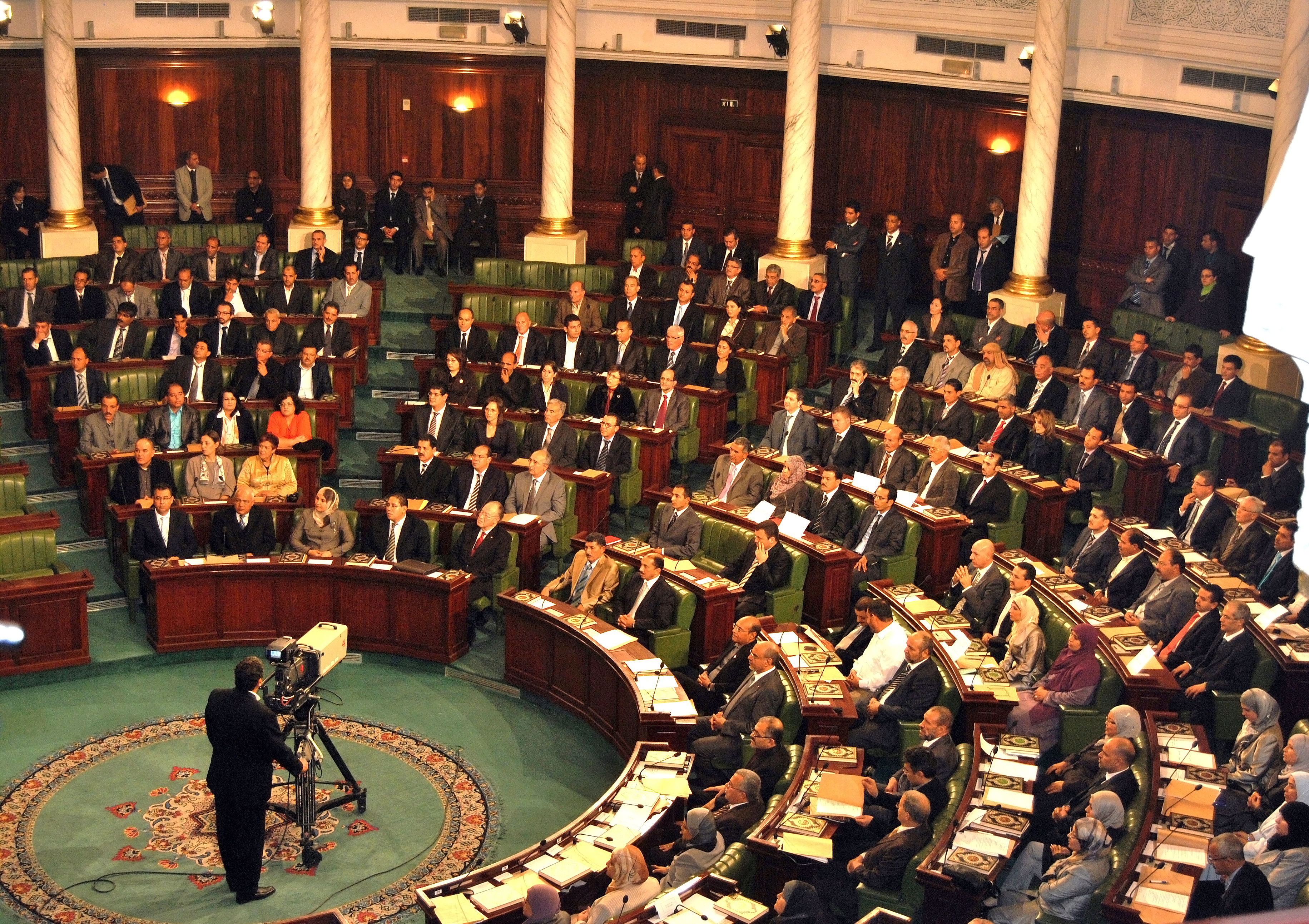 Première séance de l'assemblée constituante déroulée le 22 novembre 2011 au palais du Bardo.